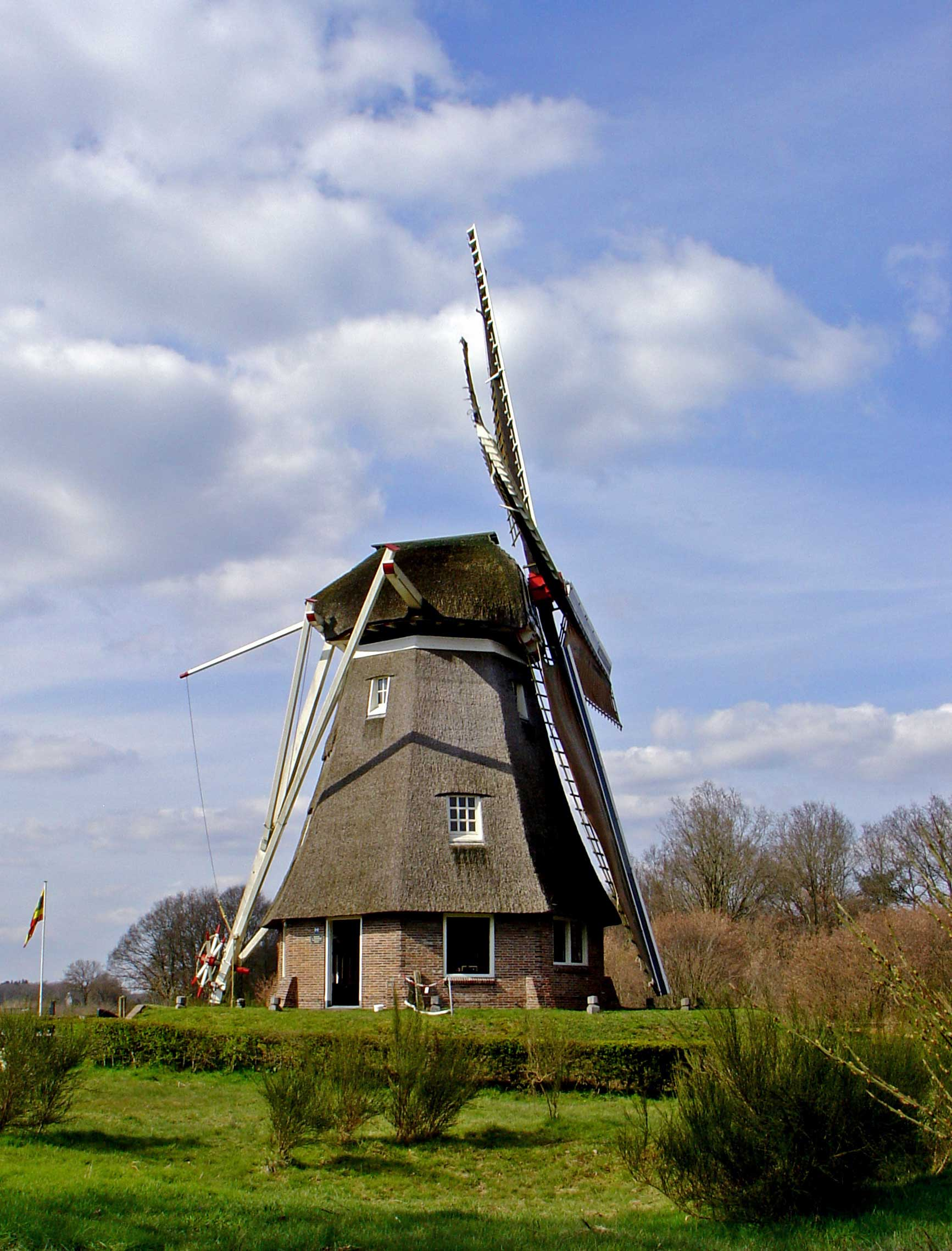 De molen Zaandplatte in Engelenad bij Ruinen (gemeente De Wolden)